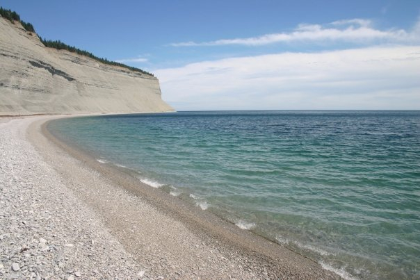 Plage de baie de la Tour à Anticosti